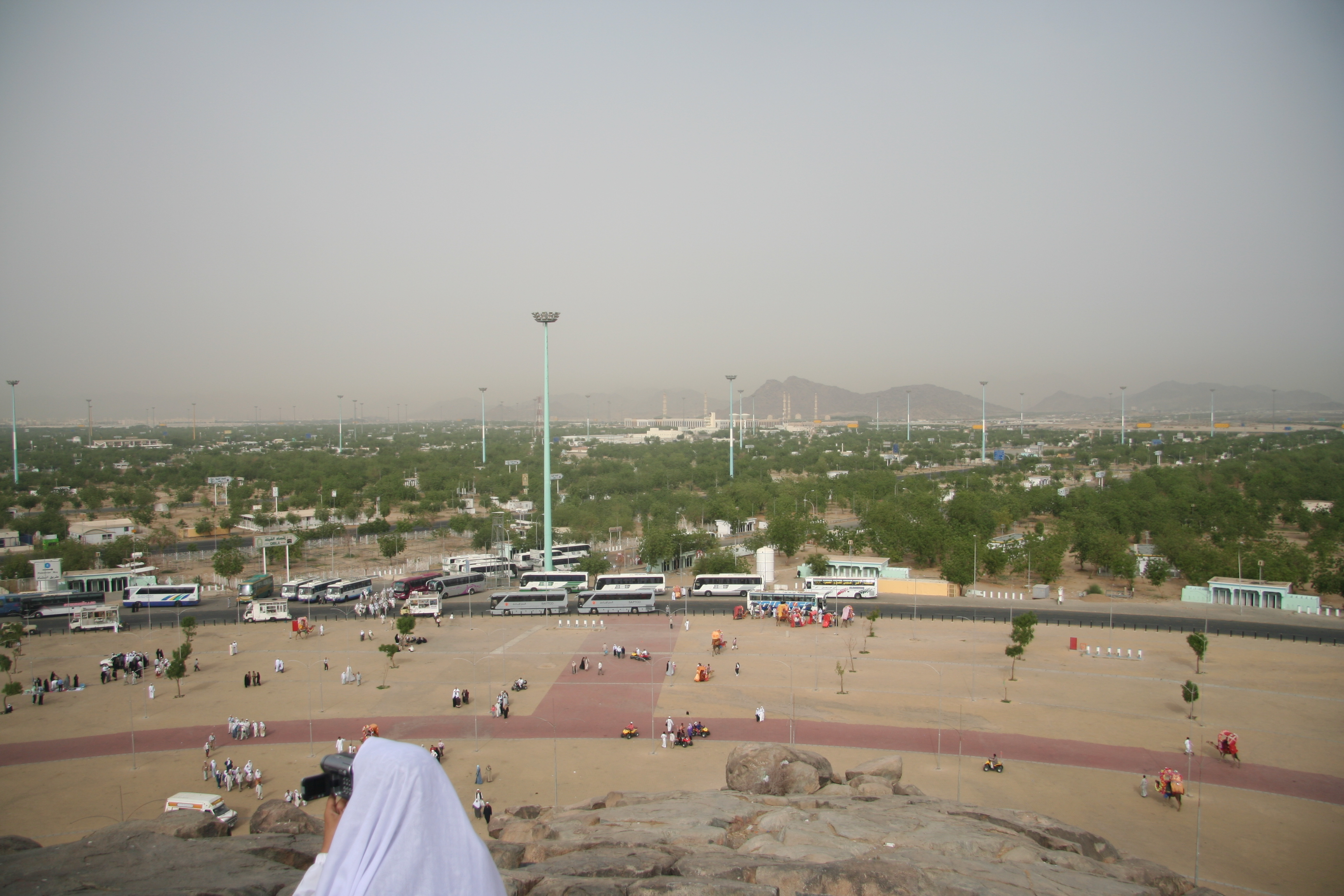 ARAFAT